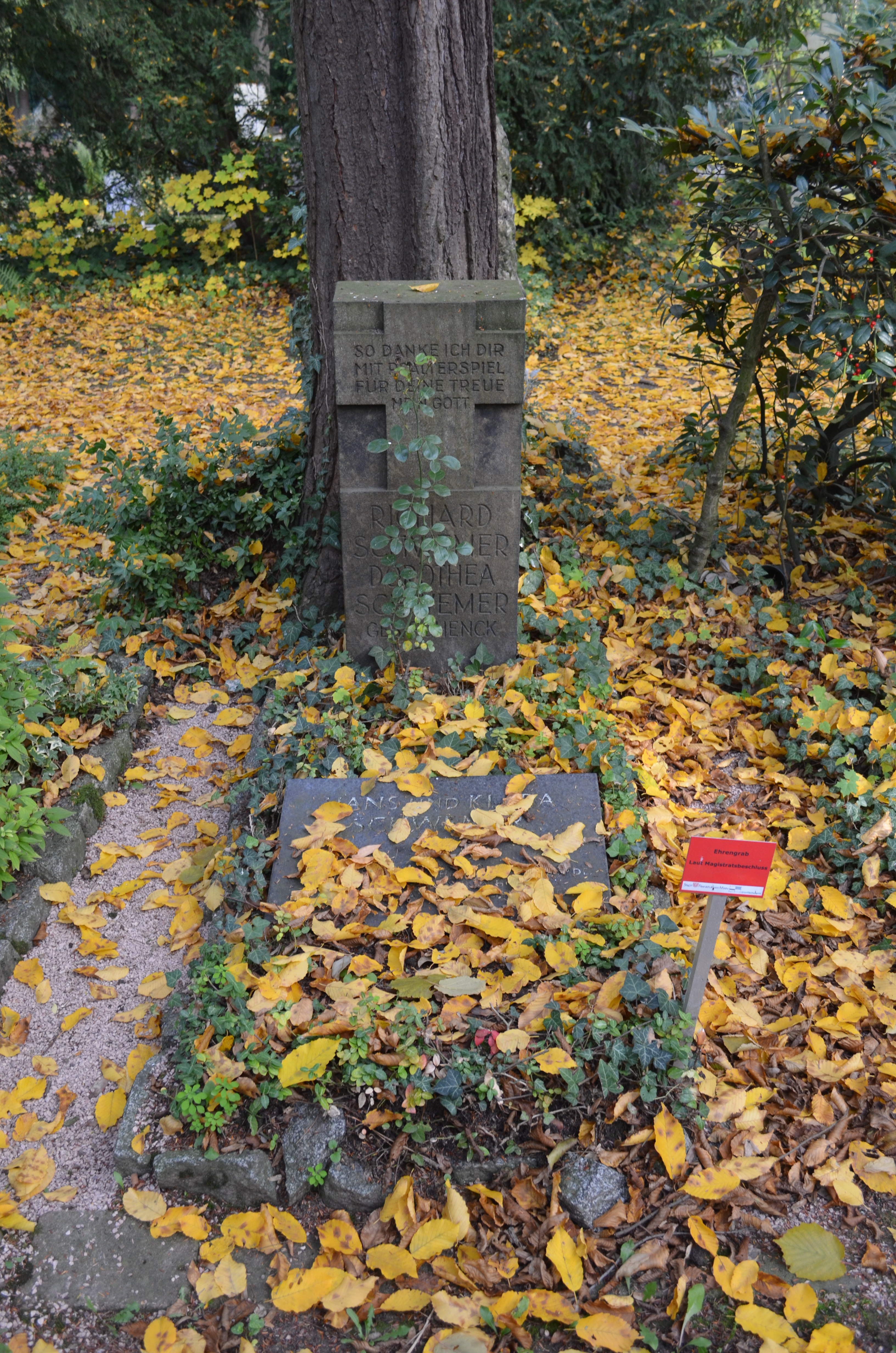 Frankfurt, Hauptfriedhof, Ehrengrab F 1721 Richard Schwemer